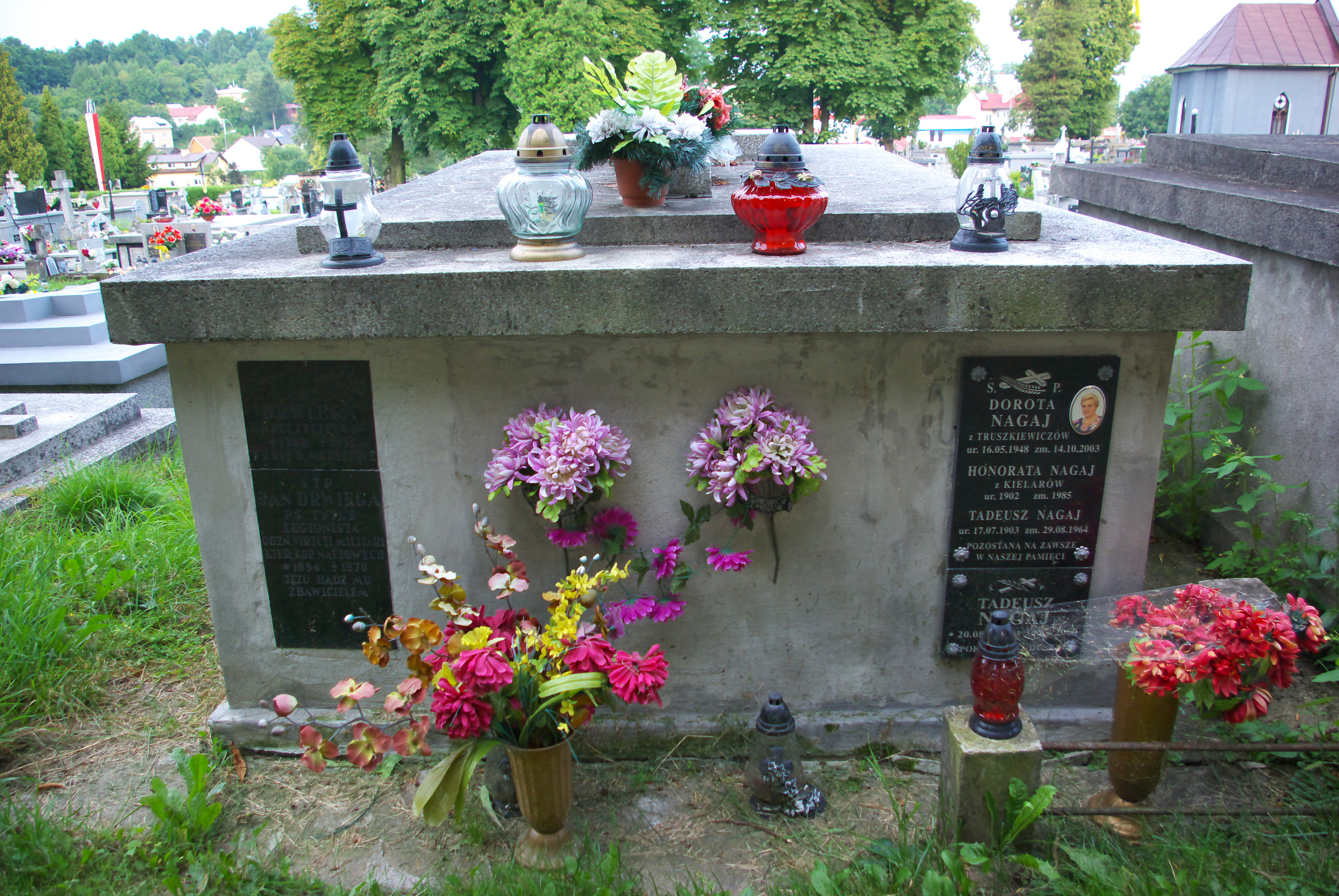 Grobowiec rodziny Drwięga i Nagaj na Cmentarzu Centralnym w Sanoku. Spoczywa Jan Drwięga, kawaler Orderu Virtuti Militari